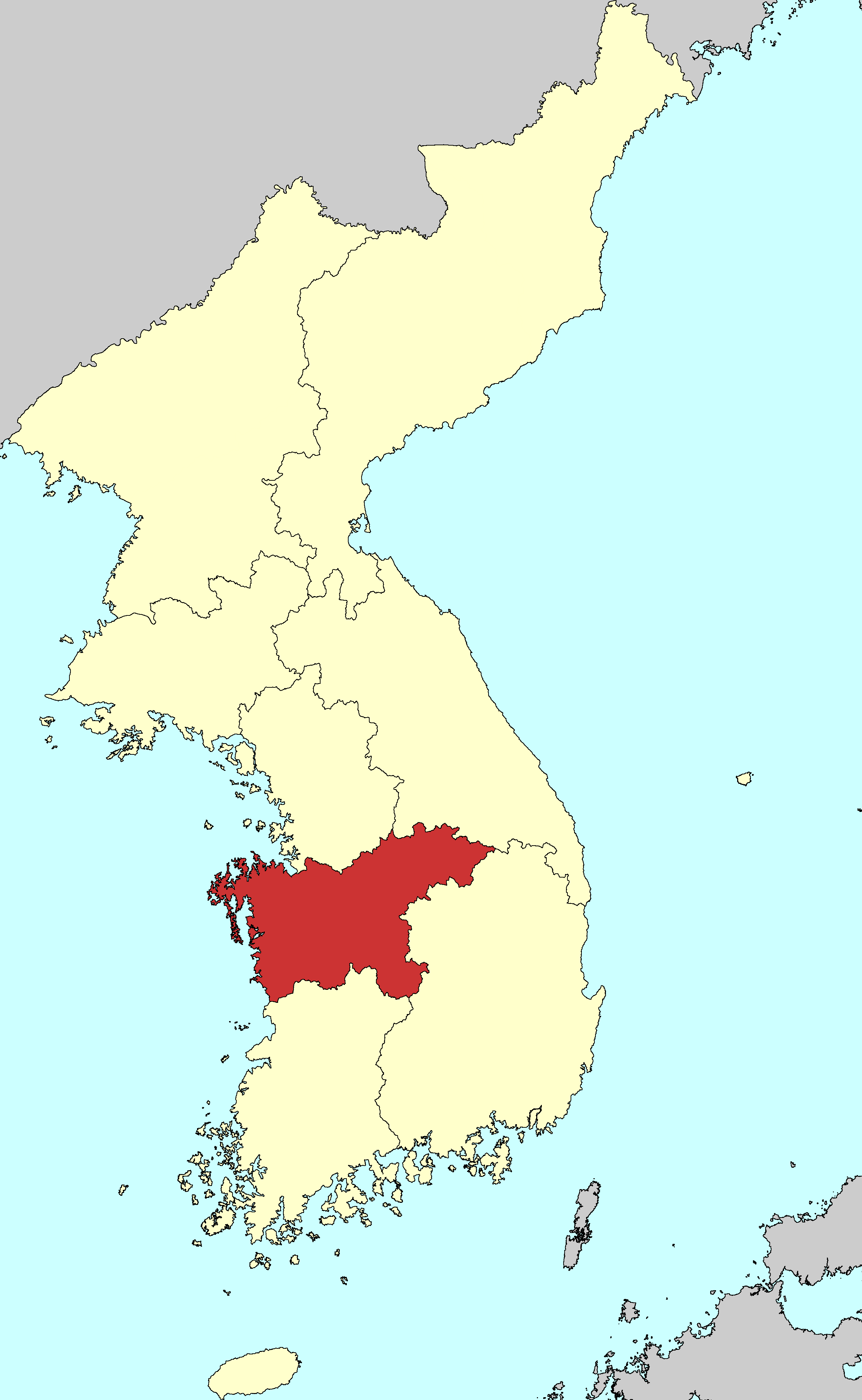 조선 후기 충청도